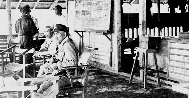 ラバウル東飛行場、戦闘機指令所での草鹿任一司令。